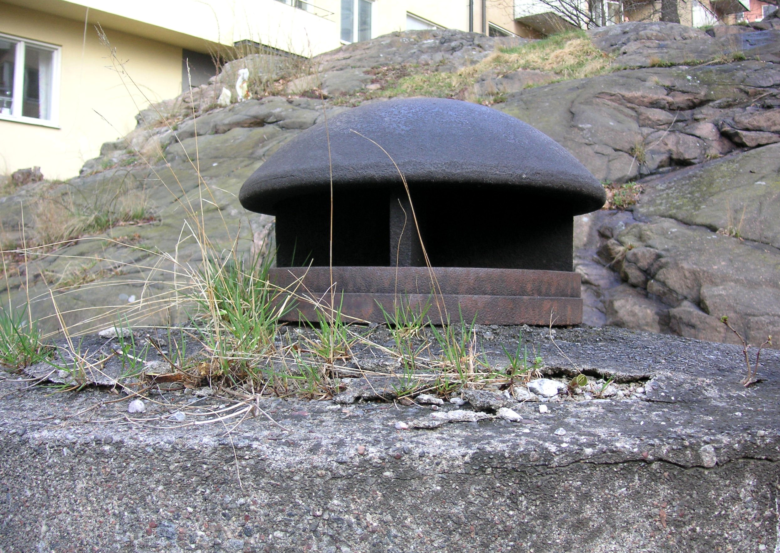 Bergrummet Lilla Essingen, splittersäkert luftintag